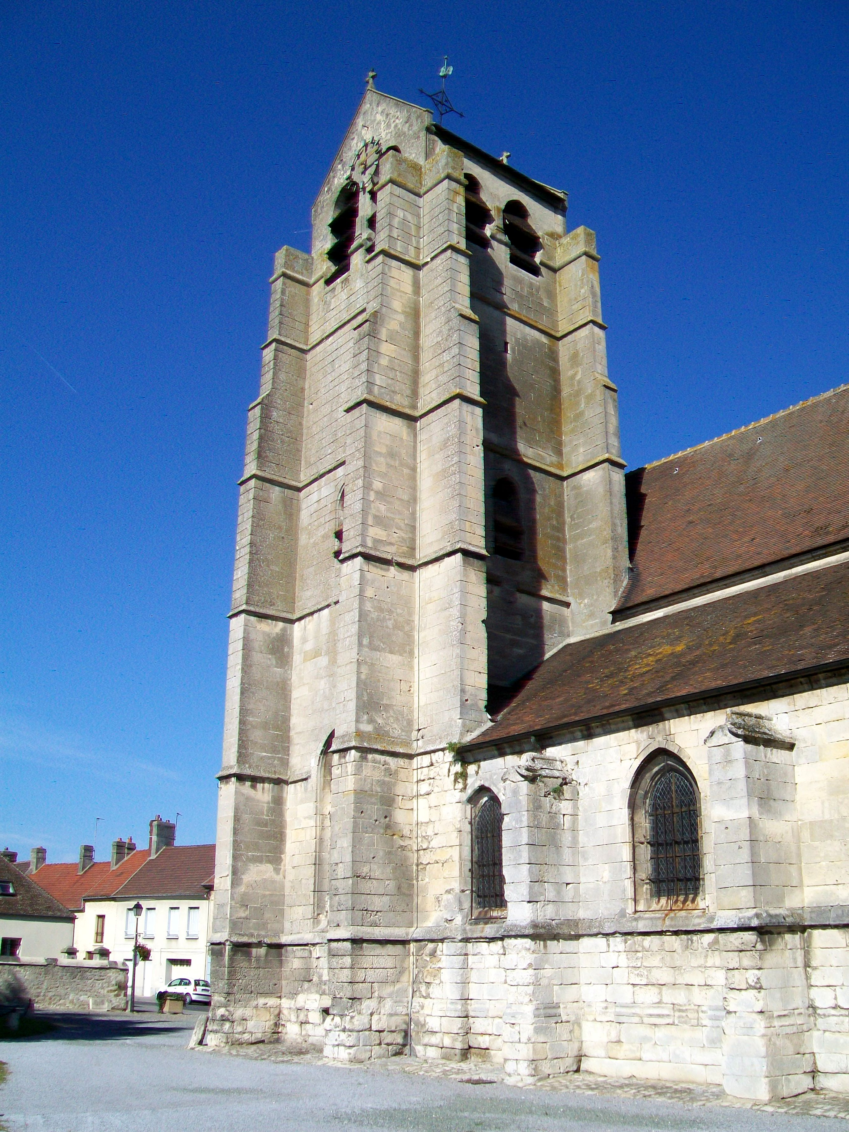 Le clocher de l'église Saint-Pierre-et-Saint-Paul, depuis le sud-est. Il est accolé à la première travée de la nef, qui en comporte quatre.